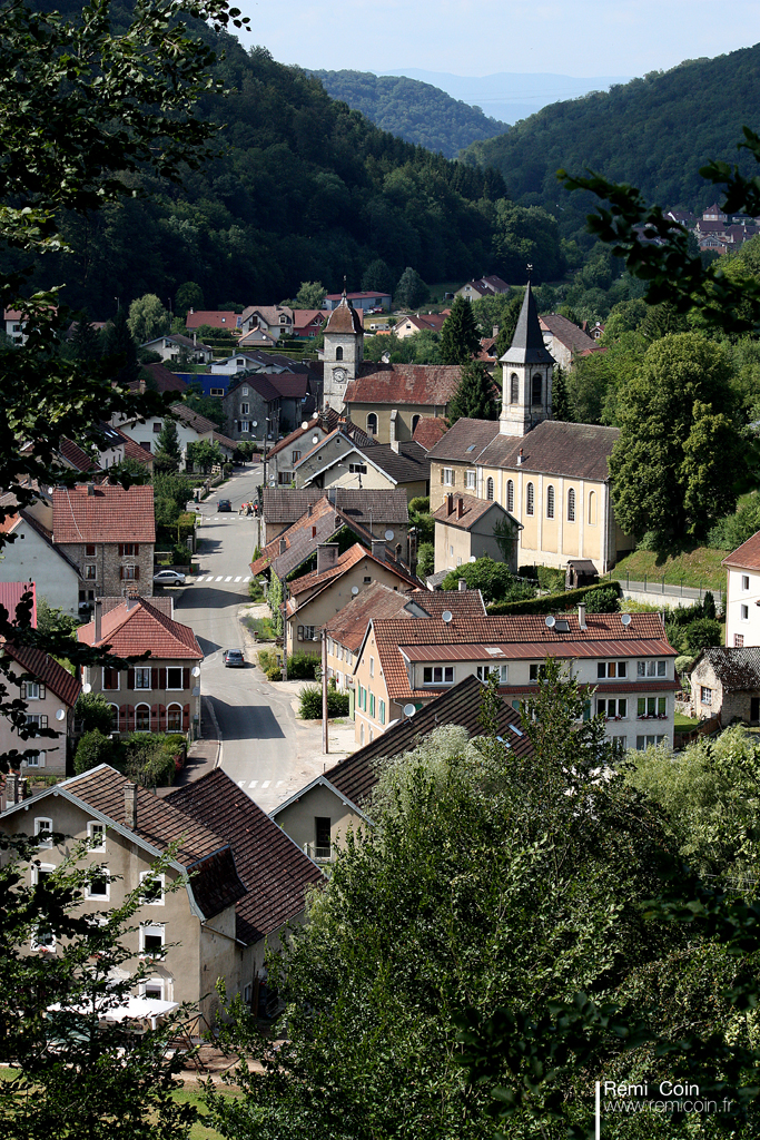 Glay, 25310, Doubs, Franche-Comté, France